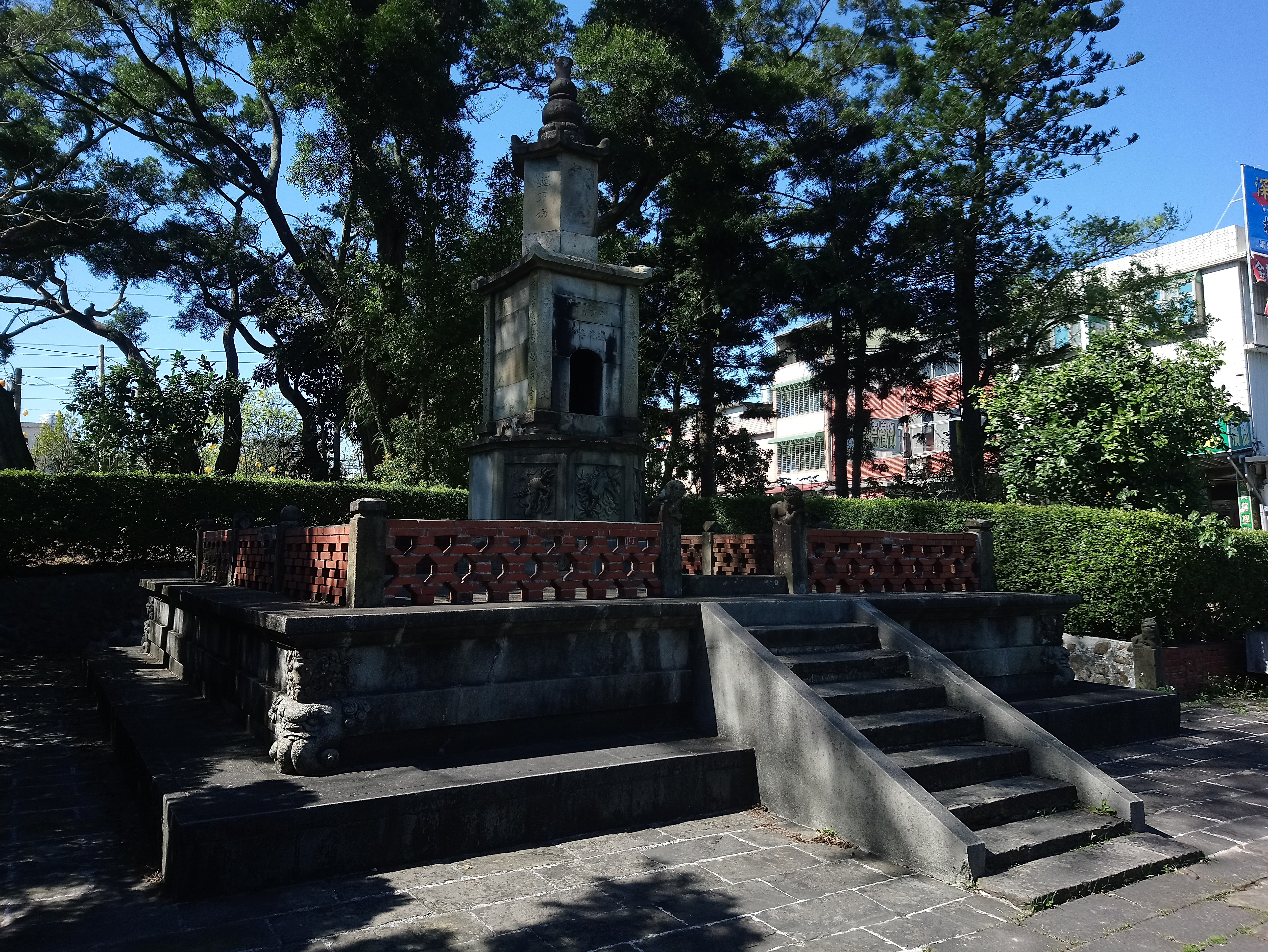 龍潭聖蹟亭,桃園市龍潭區凌雲里